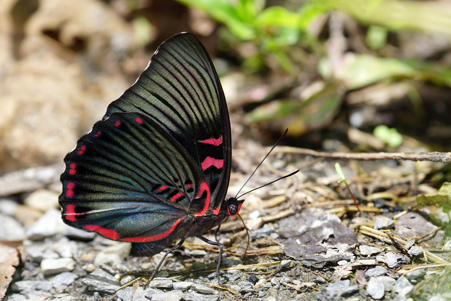 紅玉翠蛺蝶（Euthalia irrubescens），又名閃電蛺蝶、閃電蝶、暗翠蛺蝶、紅裙邊翠蛺蝶、閃電綠蛺蝶